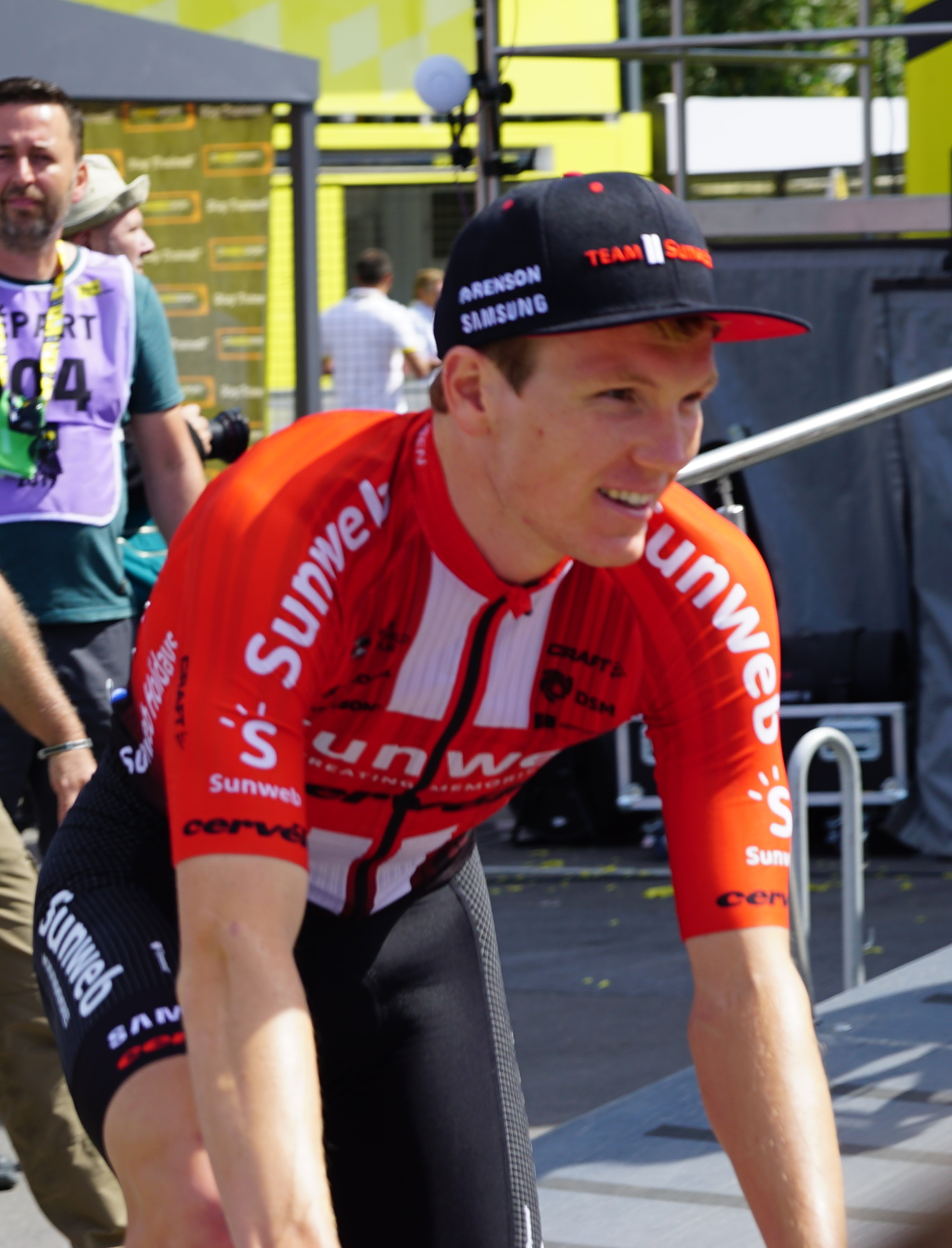 signature avant le départ de l'étape 4.